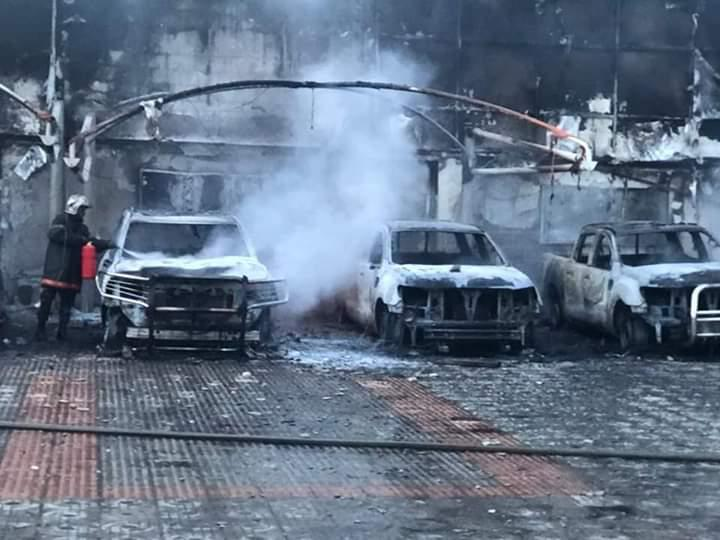 Des affrontements ont eu lieu à Cotonou, Benin, le 1er mai 2019. (VOA/Ginette Fleure Adandé)